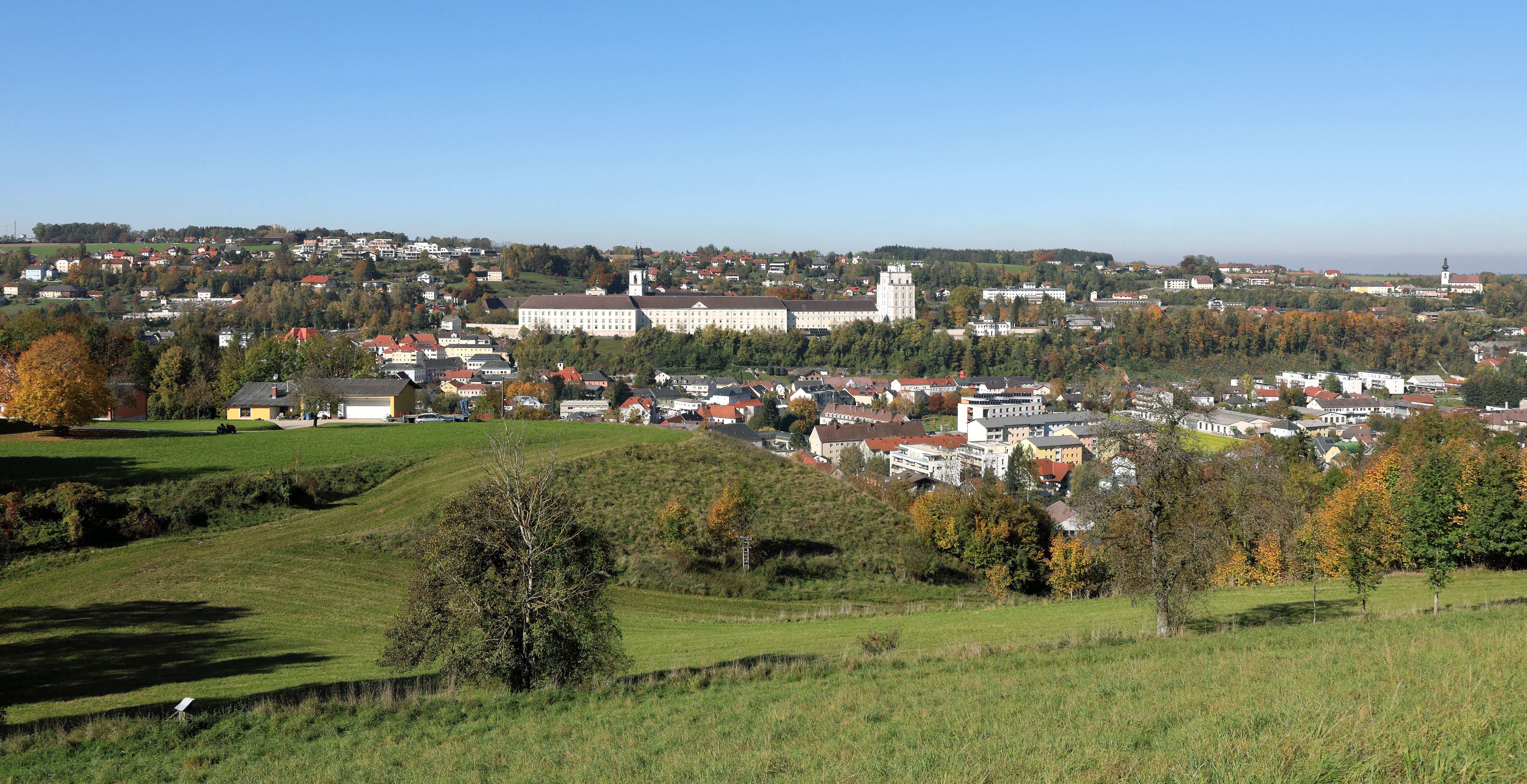 Südostansicht der oberösterreichischen Marktgemeinde Kremsmünster mit dem ortsbildbeherrschenden Stift und ganz rechts die Filialkirche hl. Stephan. Das auf einer Terrasse errichtete Kloster wurde 777 von dem bayerischen Herzog Tassilo III. gestiftet. Die Anlage des Klosterbezirkes, eine der größten Österreichs, ist ein Hauptbeispiel der österreichischen Barockbaukunst (17. und 18. Jahrhundert).